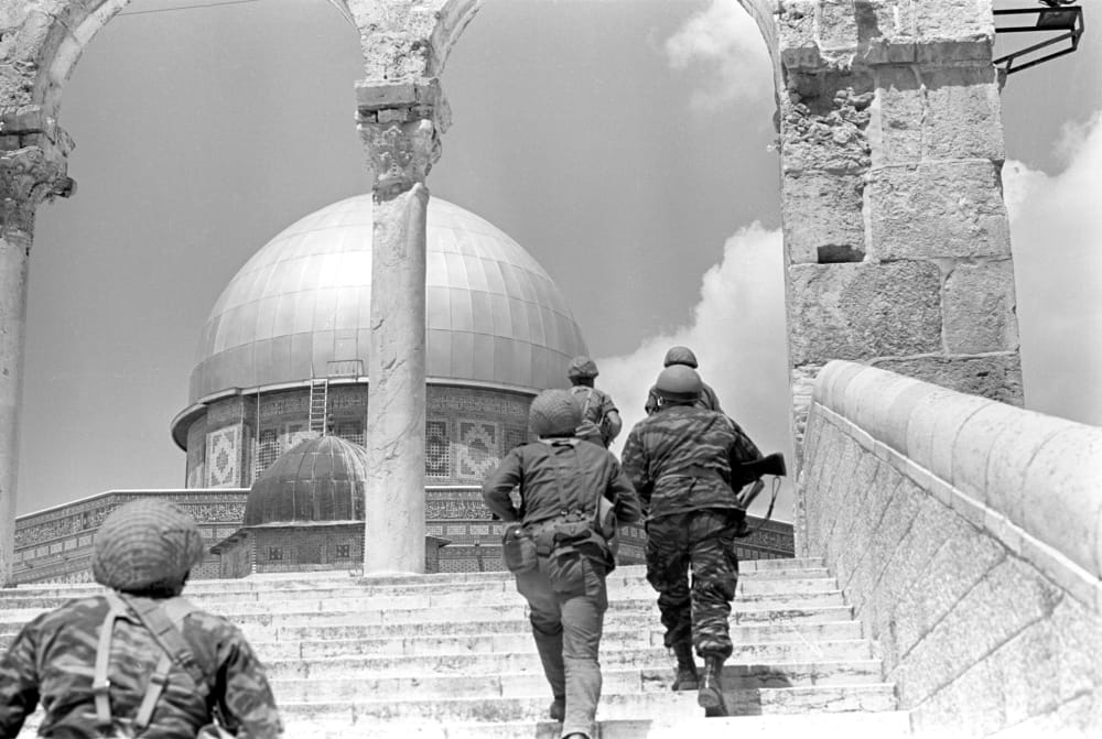 הפריצה של הצנחנים דרך שער האריות אל רחבת מסגד הסלע, מלחמת ששת הימים.